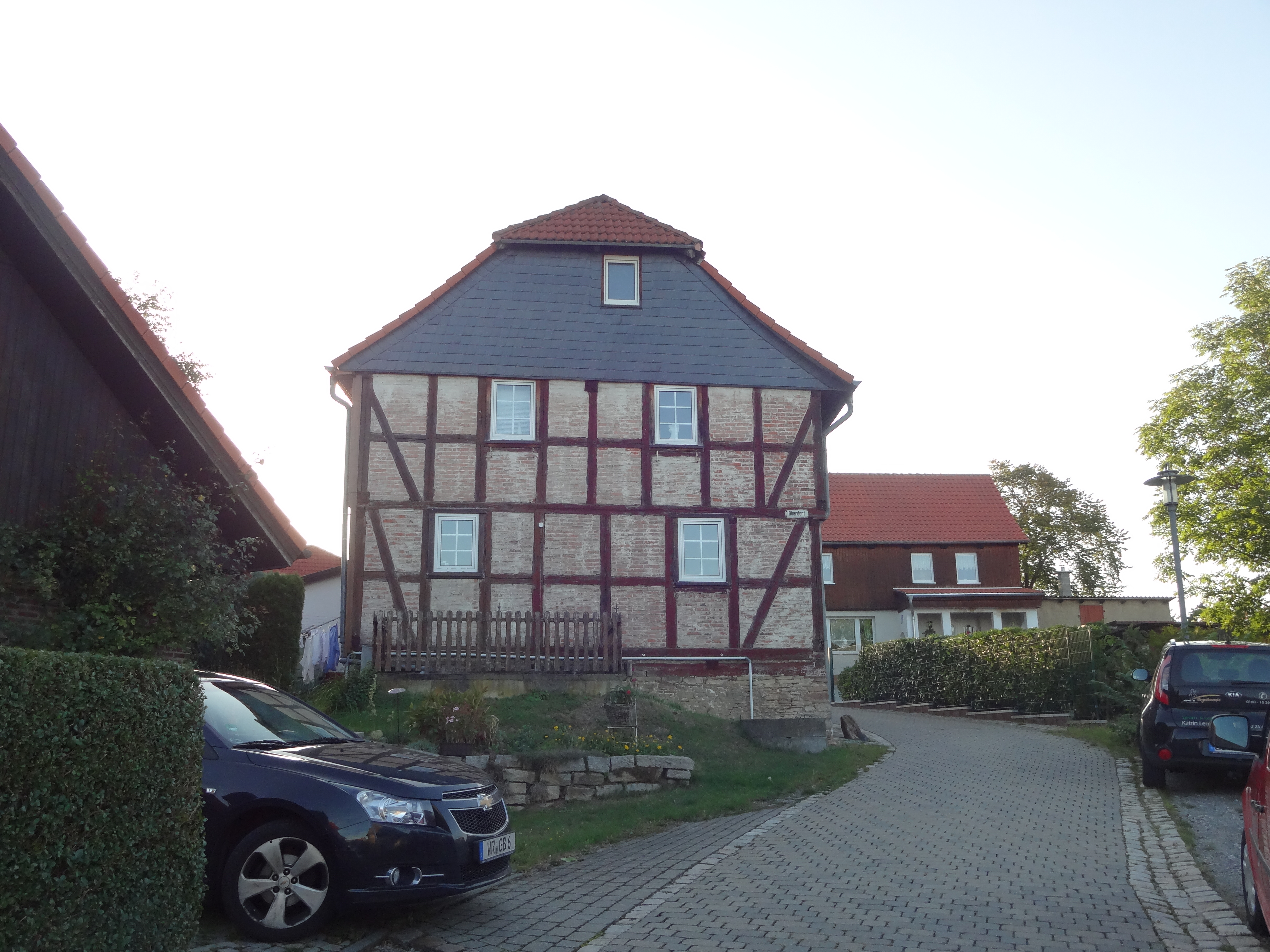 denkmalgeschütztes Wohnhaus in der Straße Oberdorf 17 in Heimburg